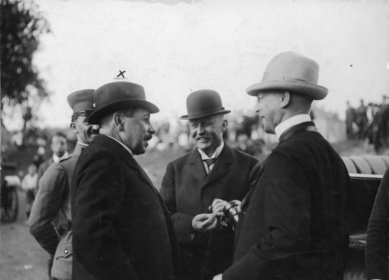 Erich Ludendorff, Gustav v. Kahr Vom Fliegergedenktag in München. General Ludendorff im Gespräch mit Ministerpräsident Dr. v. Kahr [München.- Erich Ludendorff und Gustav Ritter von Kahr beim Flieger-Gedenktag] Abgebildete Personen: Kahr, Gustav von Ritter Dr.: Ministerpräsident von Bayern, 1934 ermordet, Deutschland Pöhner. Ernst, 1870-1925. Polizeipräsident von München (vgl. Schröder, Die Münchner Polizei im Nationalsozialismus, Essen 2013, S. 21. Ludendorff, Erich: 1865-1937, General, kaiserliches Heer, MdR, NSDAP, Tannenbergbund, Deutschland (GND 118574841)